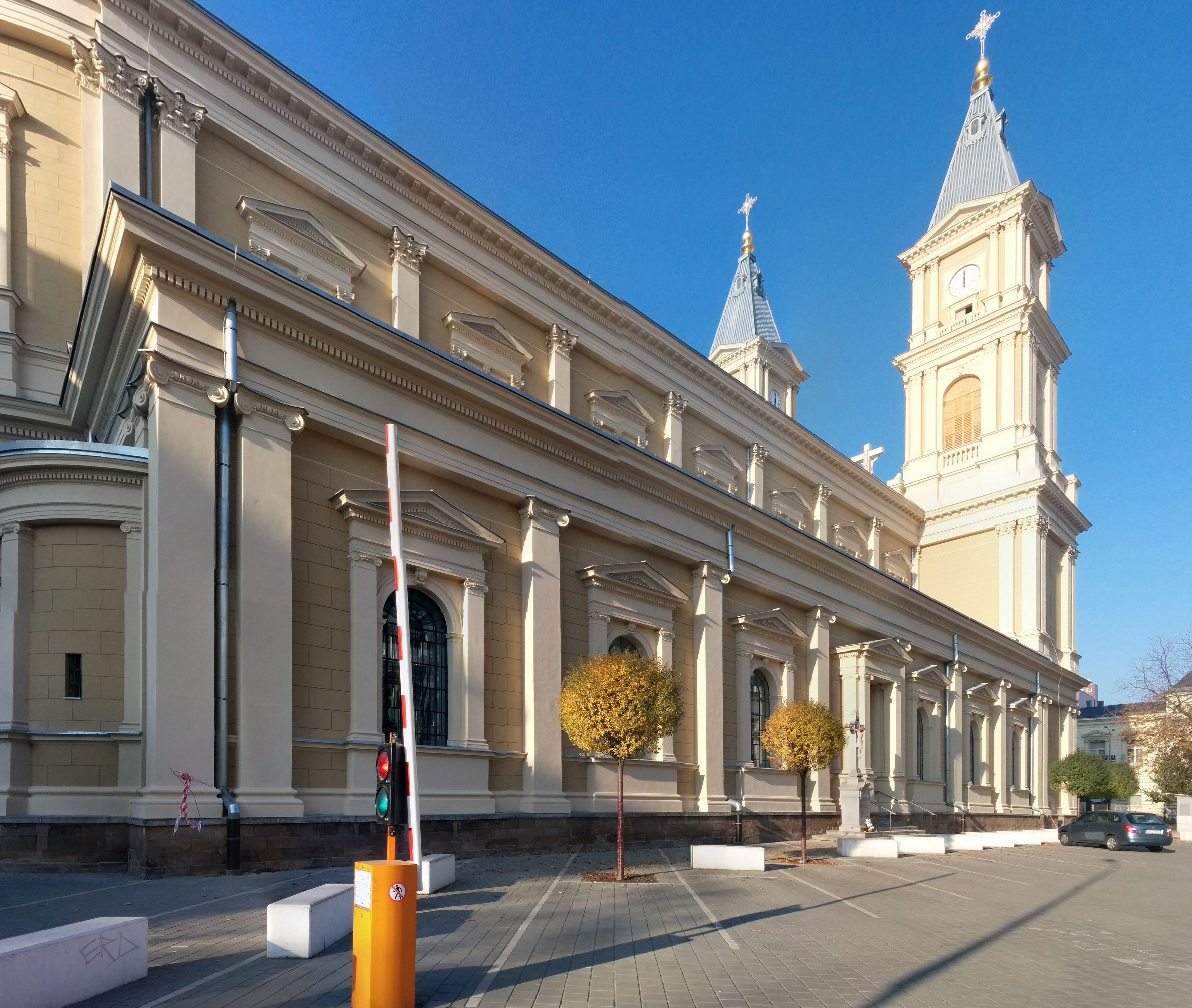 Katedrála Božského Spasitele - před dokončením rekonstrukce. Listopad 2015